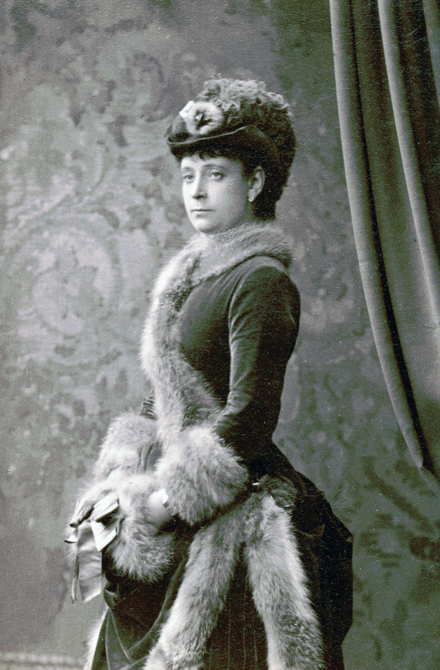 Lotten Dorsch-Bosin, skådespelare vid Nya teatern 1875